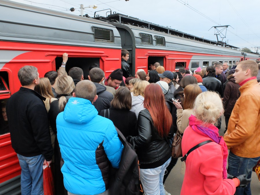 Пассажиры на станции Химки пытаются сесть в электропоезд ЭТ2М-086 в час пик